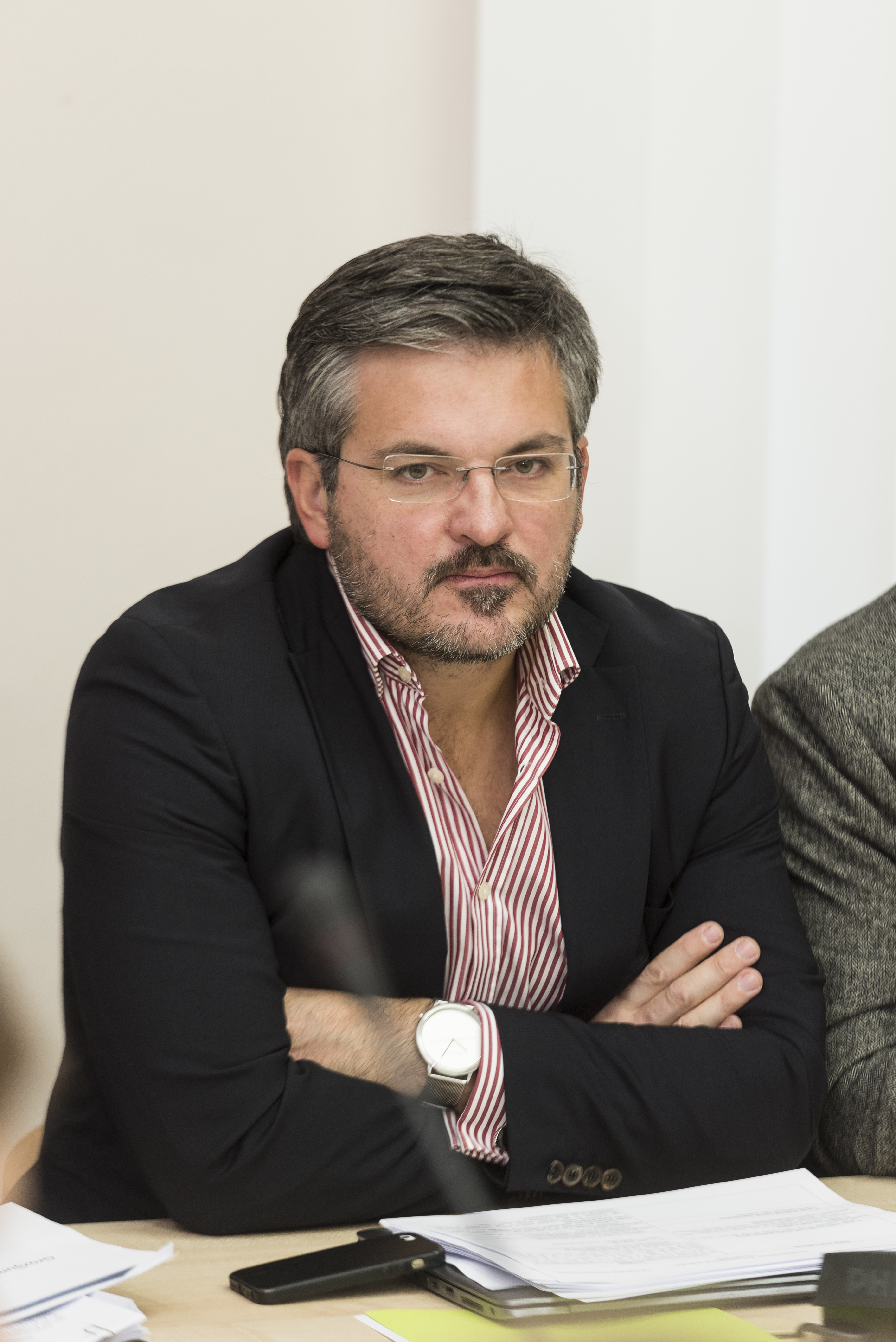 2015.gada 23.oktobris. Budžeta un finanšu (nodokļu) komisijas sēde. Foto: Reinis Inkēns, Saeima Izmantošanas noteikumi: saeima.lv/lv/autortiesibas